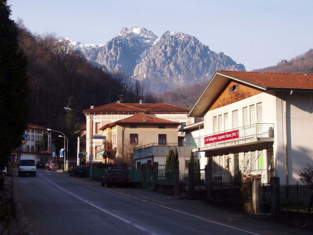 Schio, Veneto, ItaliaP1010026